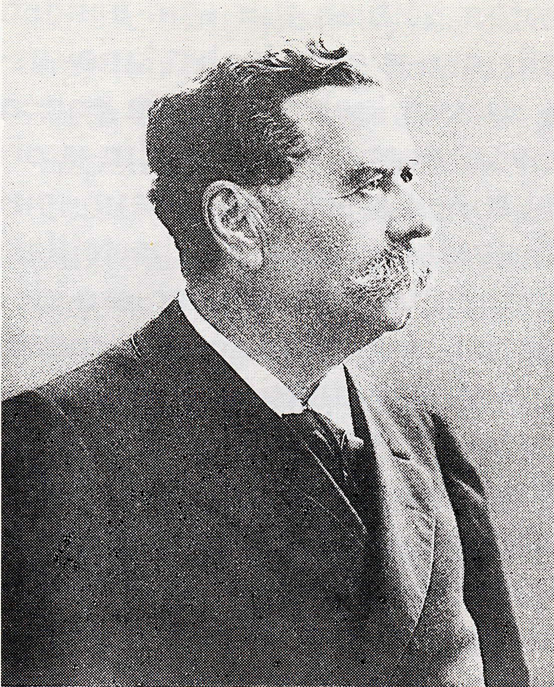 Fysiikan professori Selim Lemström (1838–1904).